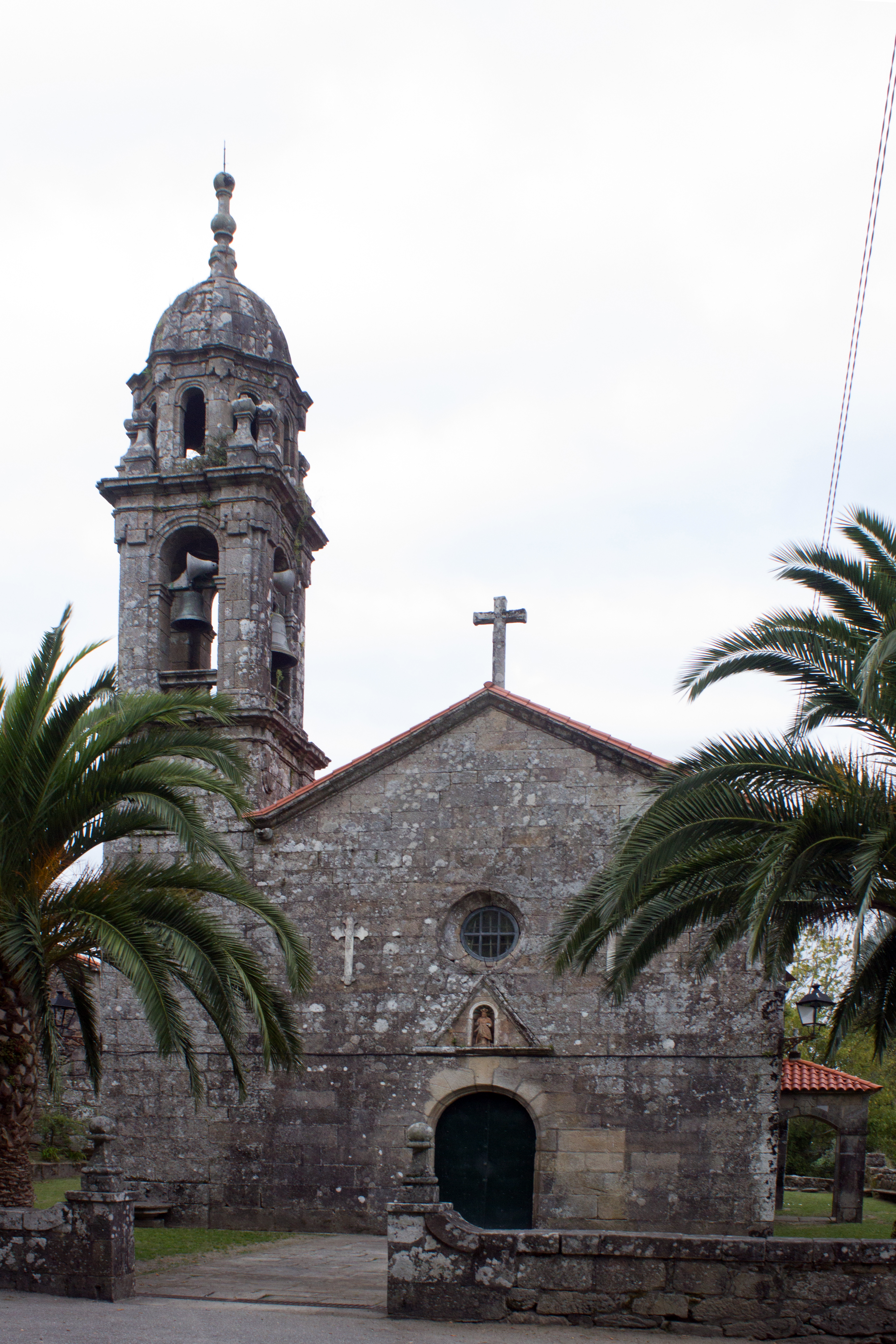 Igrexa de Santa Mariña de Carracedo, no concello de Caldas de Reis.